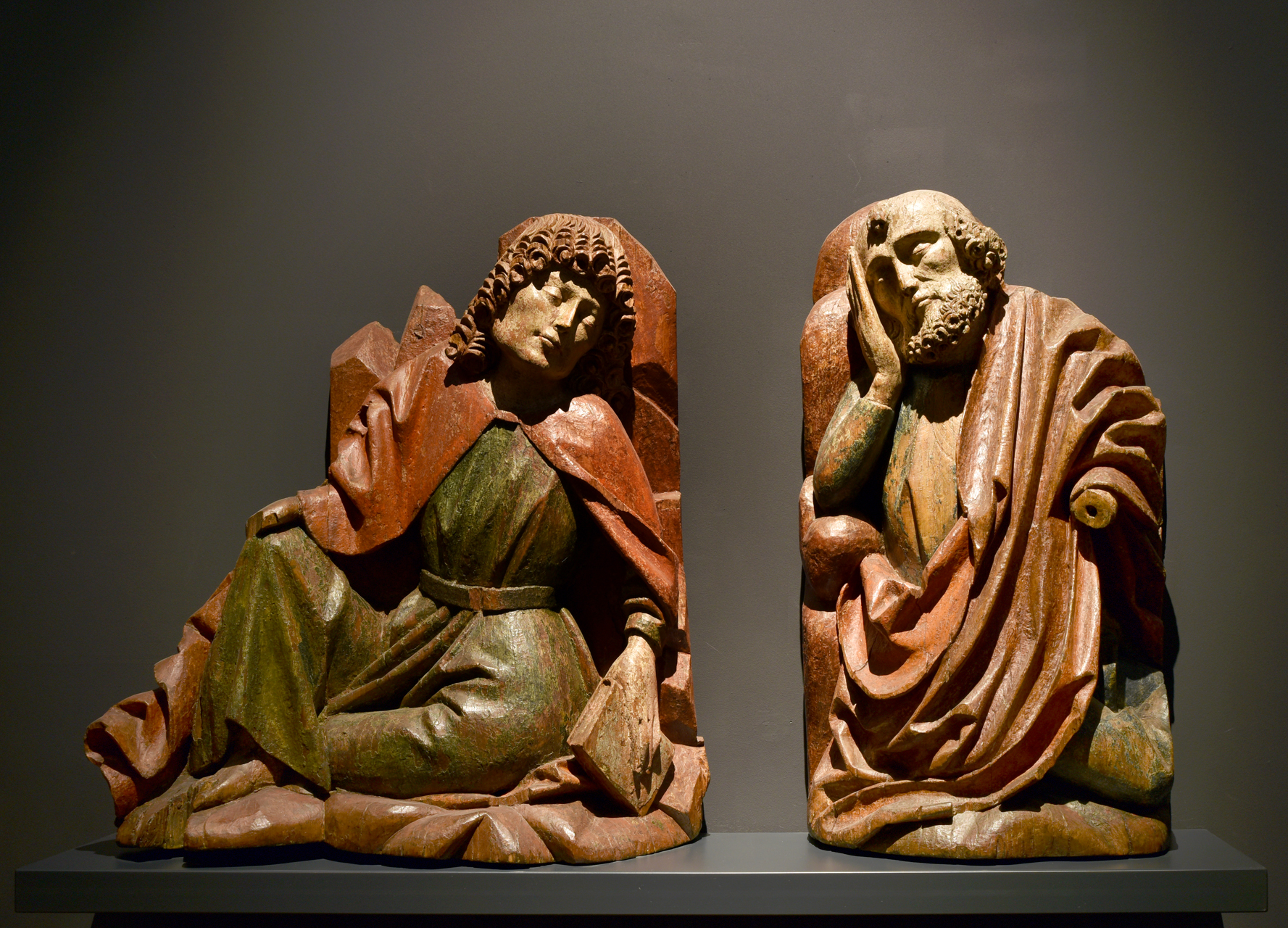 Fragment sousoší Olivetské hory (1500-1510), GVU Cheb